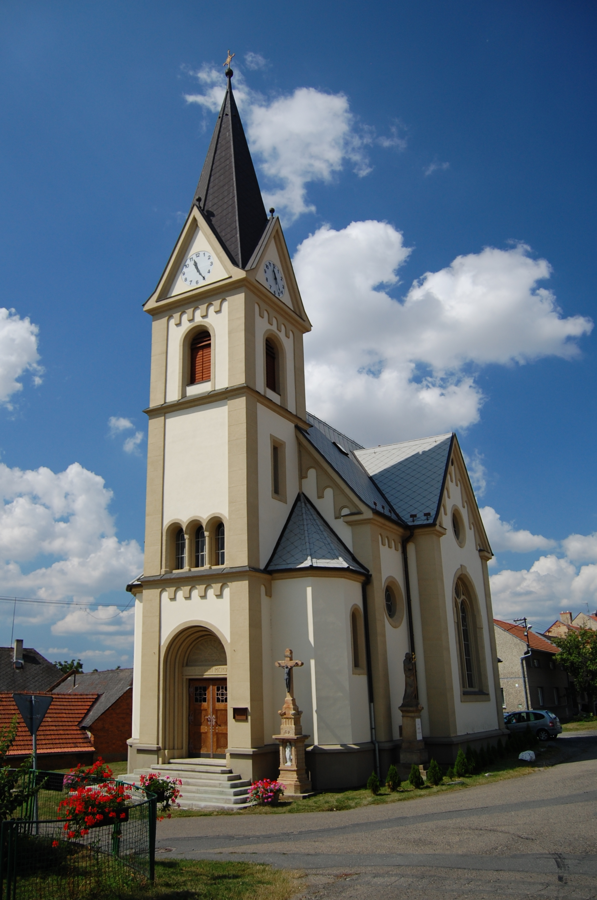 Kostel na návsi - pohled zepředu, Držovice, okres Prostějov